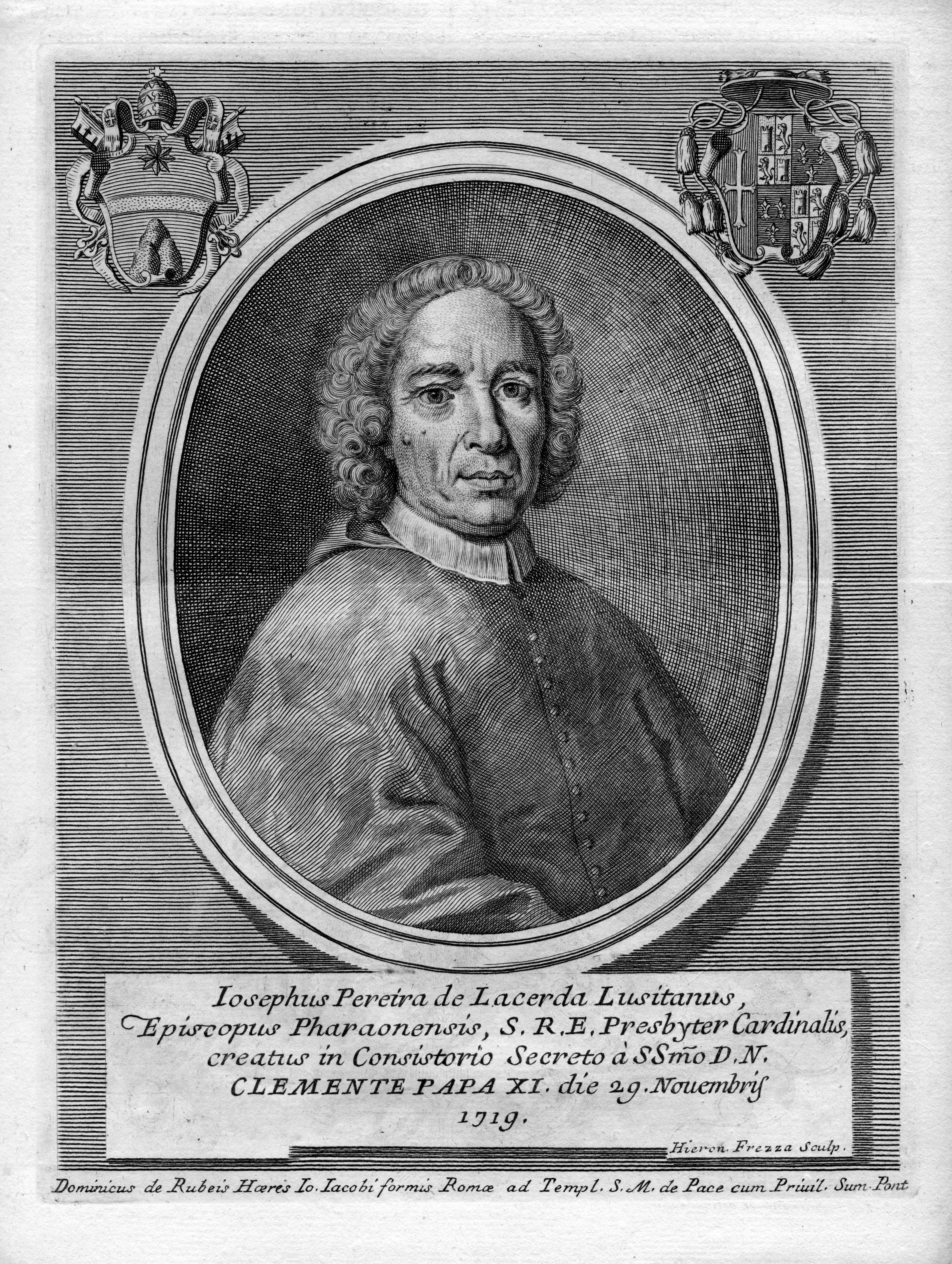 Cardeal José Pereira de Lacerda (1662-1738)